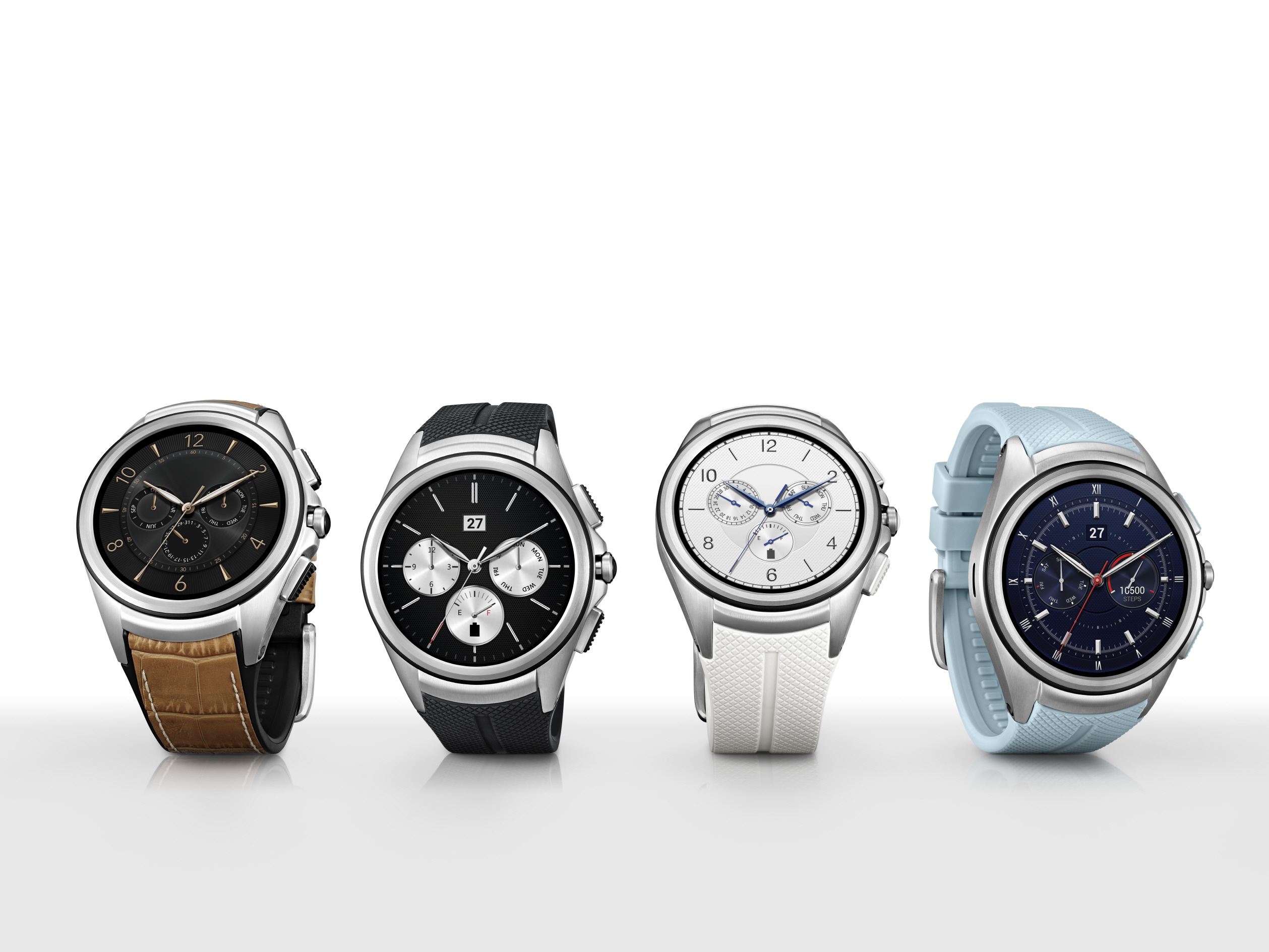 LG전자, ‘LG 워치 어베인 2nd 에디션’ 공개 ■ LTE통신기능 지원하는 첫 안드로이드 웨어 스마트워치 □ 스마트폰 없이 단독으로 LTE 음성통화, 메시지 송/수신 가능 □ 안드로이드 4.3(젤리빈)과 iOS 8.2 이상의 모든 스마트폰과 연동 ■ 아날로그 감성의 ‘리얼 워치’ 디자인에 하드웨어 사양 강화 □ 원형 메탈 몸체에 3개의 물리버튼 적용해 직관적인 사용 가능 □ 현존 스마트워치 중 세계 최고 해상도(480×480, 348ppi) 탑재 □ LTE 통신 지원하는 대용량 배터리(570mAh) ※ Social LG전자 ( 에서 관련 보도자료를 확인하실 수 있습니다.